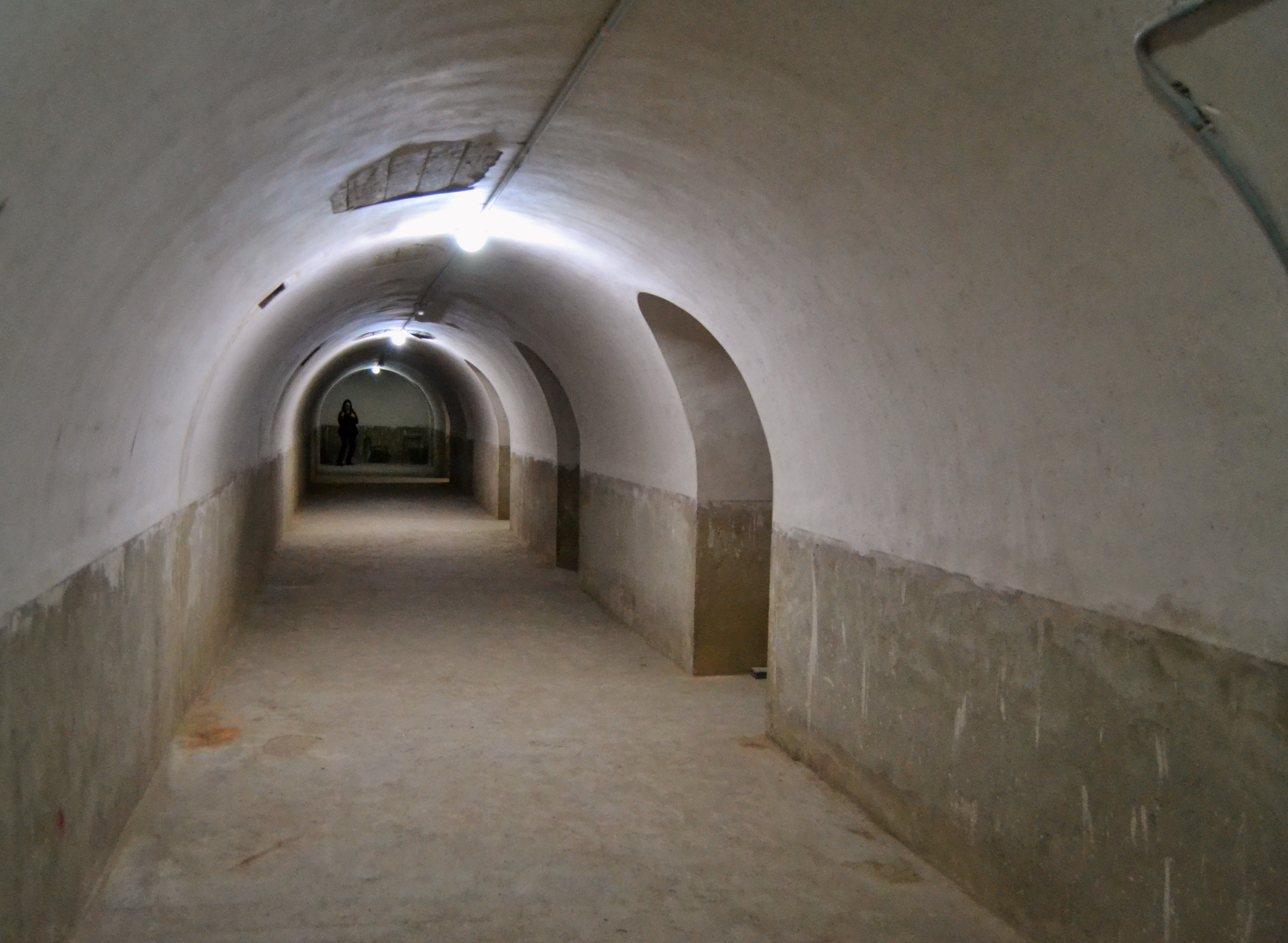 Galeria del refugi antiaeri de l'Institut Lluís Vives, València.